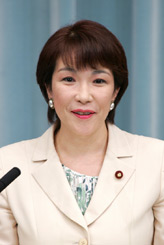 2006年9月に内閣府特命担当大臣としての入閣に際して公表された肖像写真